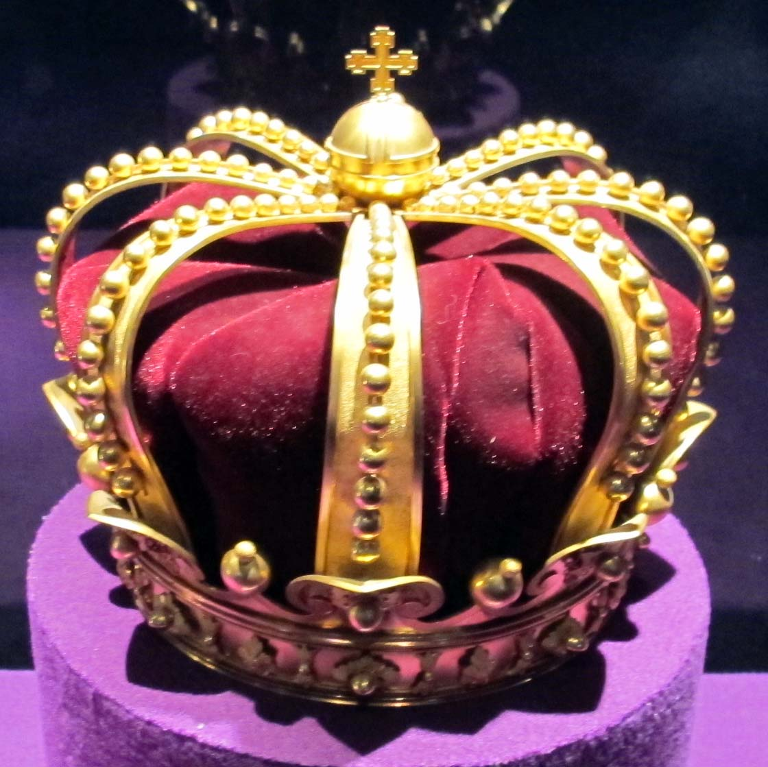 Corona indossata dalla regina elisabetta alla cerimonia di proclamazione del regno di romania, 10-22 maggio 1881